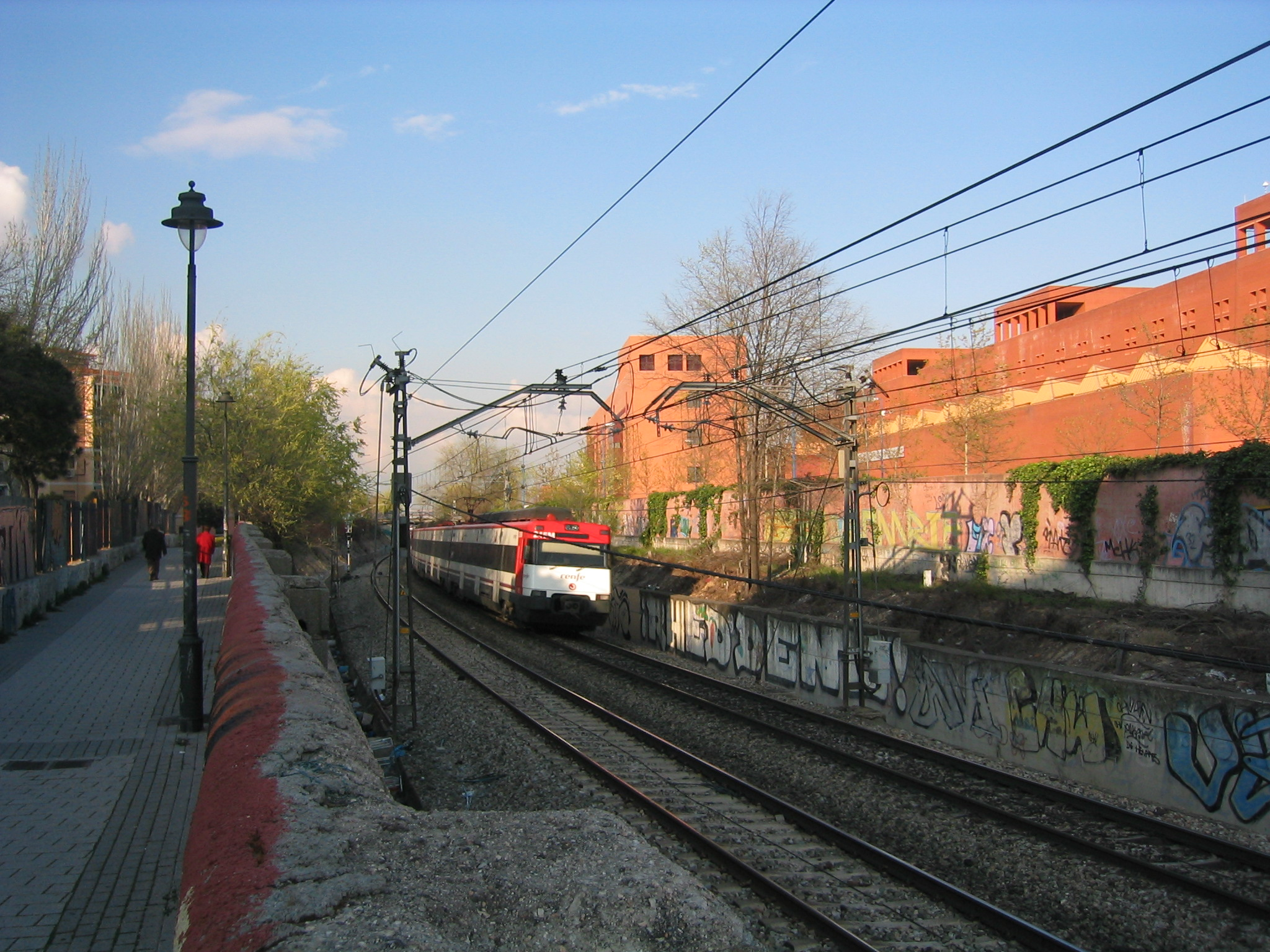 Vista de un tramo de la línea ferroviaria de cercanías C-5 a su paso por San Nicasio, en el municipio de Leganés (Madrid, España).